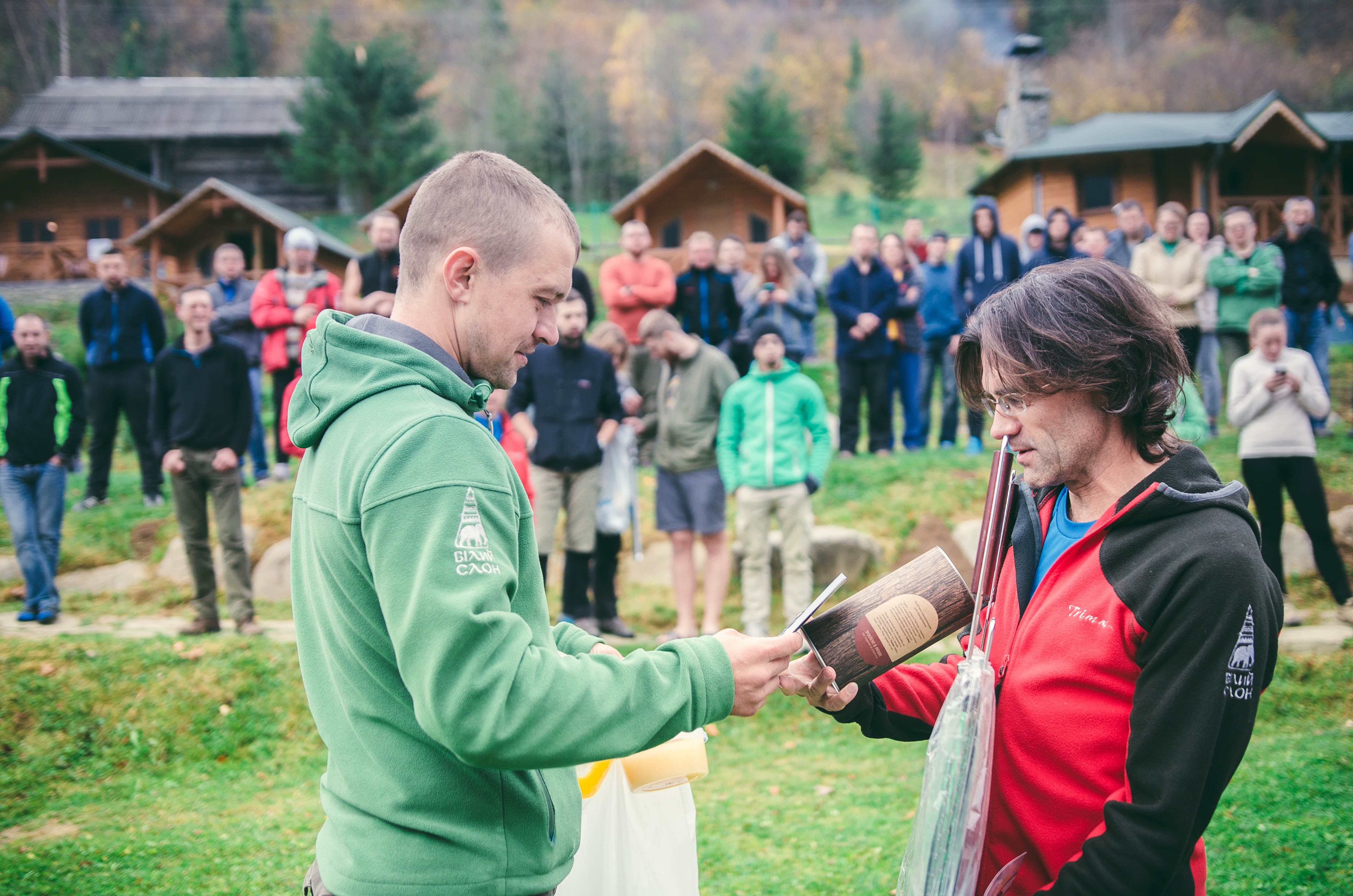 Сергія Сапігу (праворуч; переможця Чорногірського марафону 2017 у категорії "Чоловіки") вітає Володимир Горон (ліворуч; один із організаторів змагань). Нагородження відбувається у кемпі "Білий Слон", що у с. Дземброня (місце фінішу марафонців).